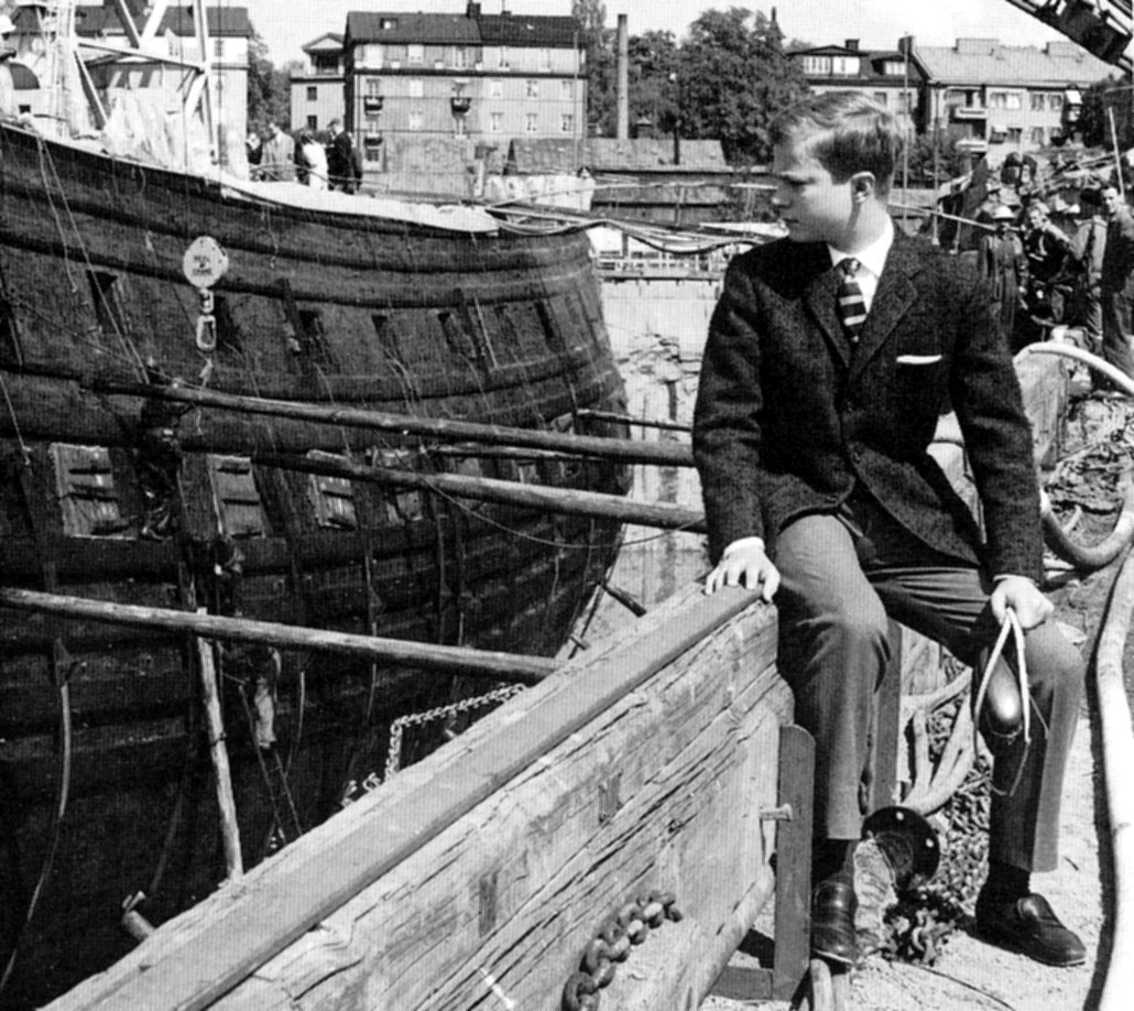 Kronprins Carl Gustaf och Regalskeppet "Vasa" på Beckholmen, Stockholm